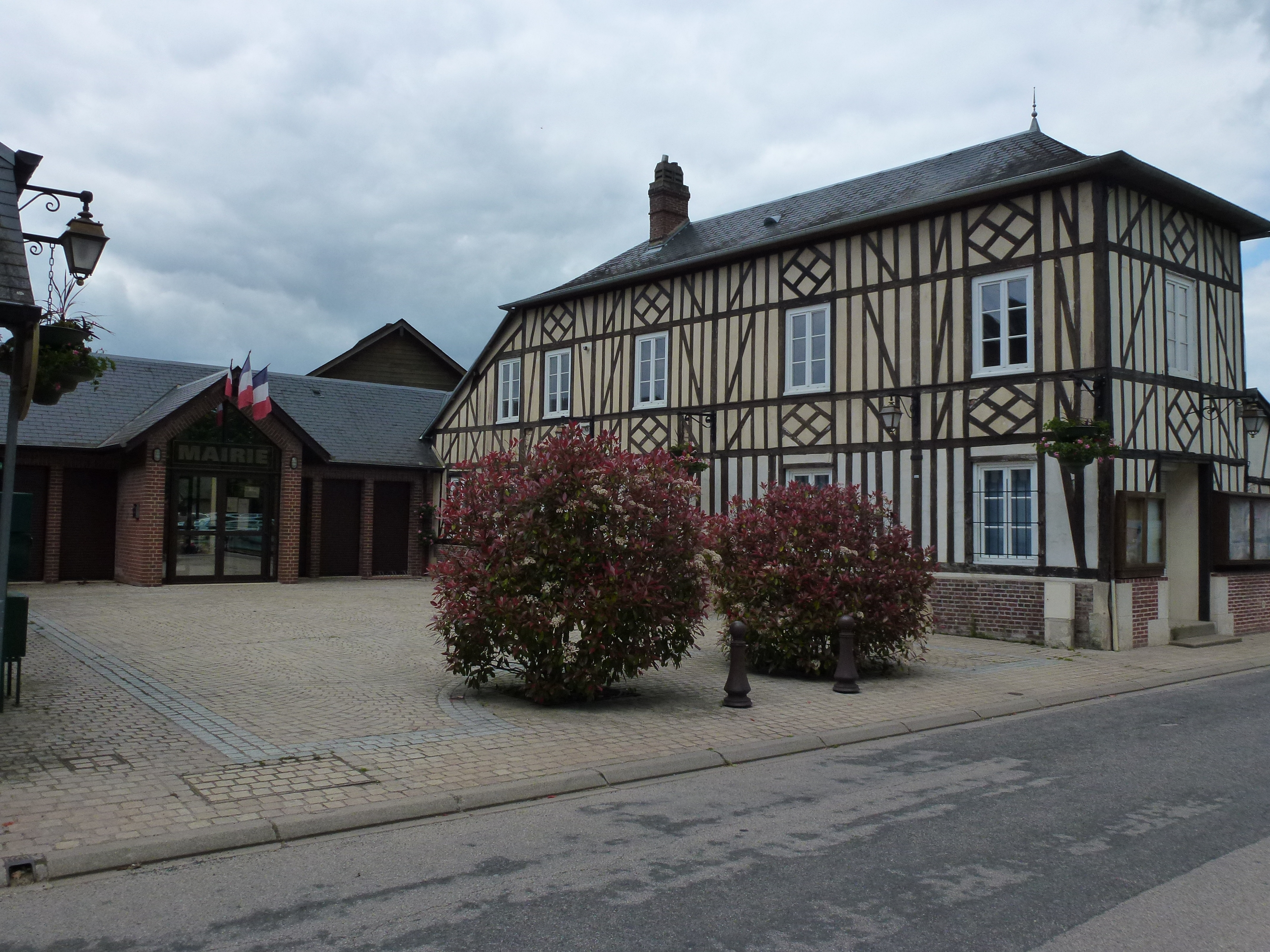 Amfreville-la-Campagne (Eure, Fr) mairie